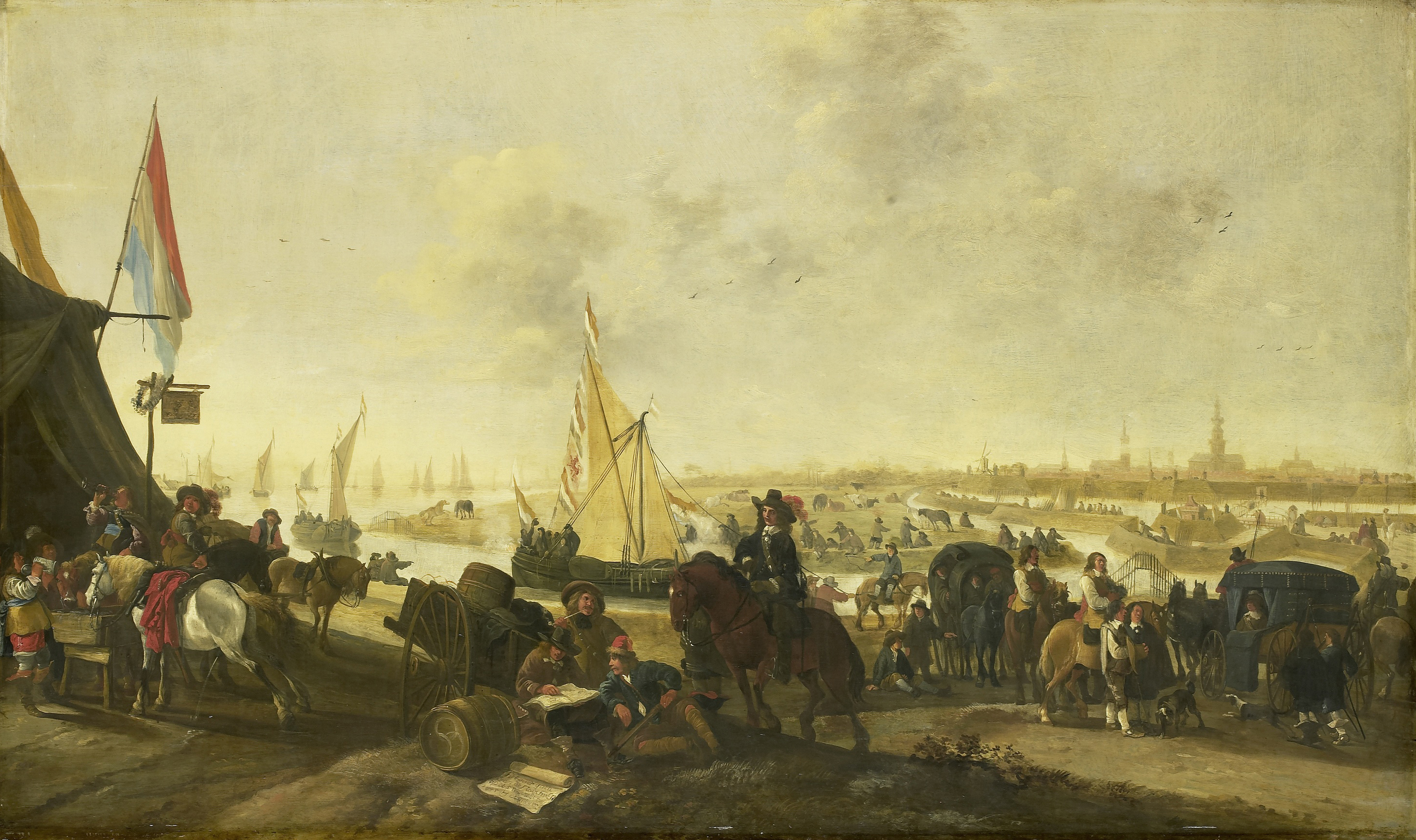 De verovering van de stad Hulst op de Spanjaarden, 5 november 1645. Gezicht in het kamp van de belegerende troepen. Rechts enkele koetsen, in het midden een officier te paard bij een groepje soldaten met een boek. Links drinkende officieren te paard bij een tent waar de vaandel uithangt, hierbij ook een pissend paard. In de verte de stad Hulst.